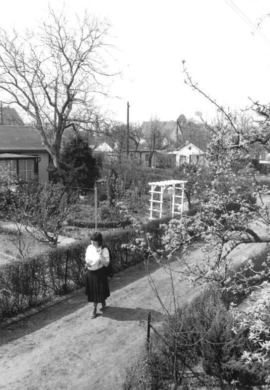 Berlin, Blick in eine Kleingartensiedlung ADN-ZB Ritter 21.4.88 pe Berlin: Zum VKSK-Kongreß. Auch als Spaziergänger kann man die Schönheit der Natur in einer Kleingartenanlage genießen. Die VKSK-Anlage Kissingen in Pankow-Rosenthal ist mit ihren 146 Parzellen seit zehn Jahren "Staatlich anerkanntes Naherholungsgebiet". Auch einer Fläche von 1 780 ha gibt es in Berlin 36 840 Kleingärtner mit 74 268 Mitgliedern des VKSK. Zusammen mit anderen Sparten zählt der VKSK in der Hauptstadt 92 481 Mitglieder (s. 21, 22N)